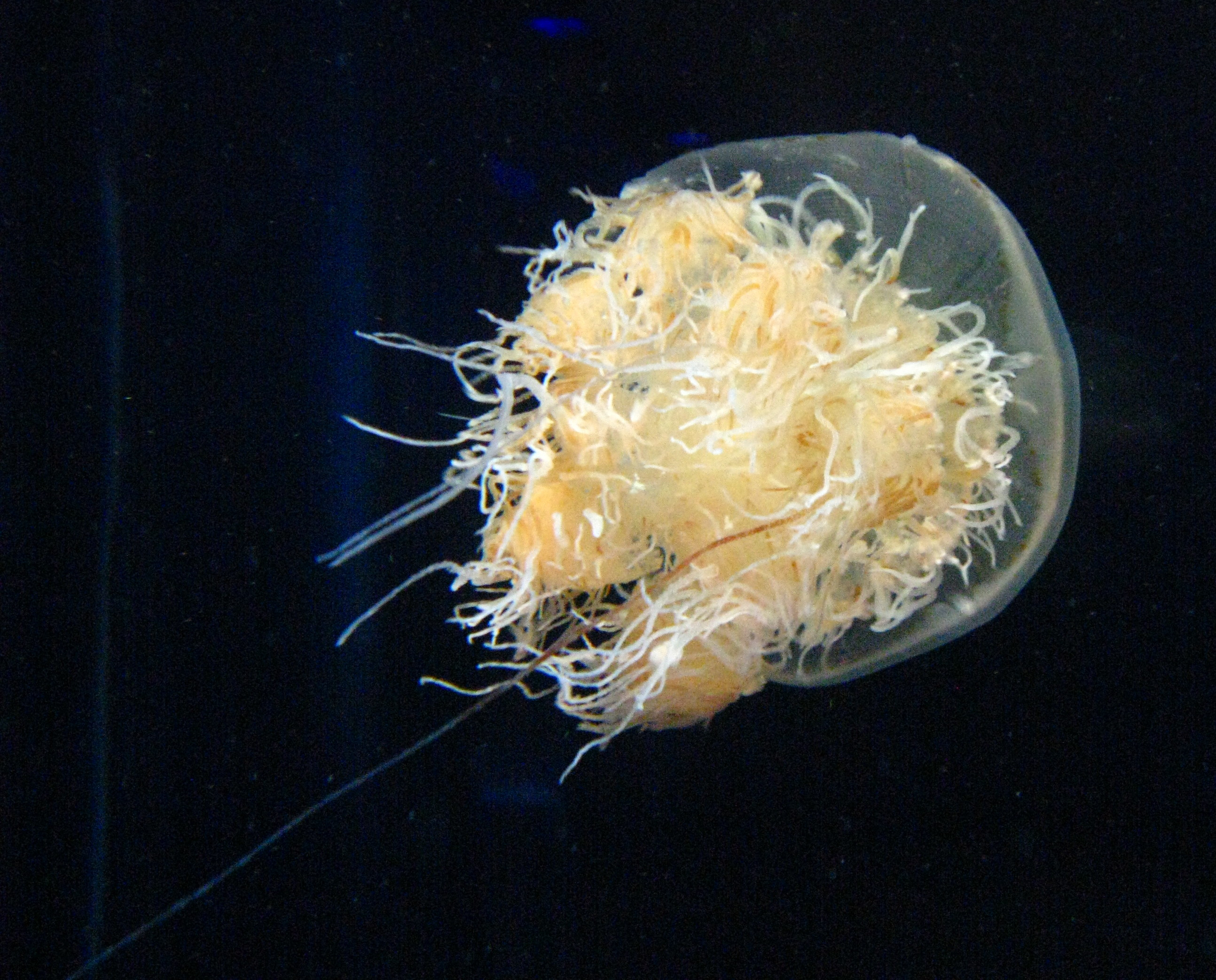 Scientific name Nemopilema nomurai